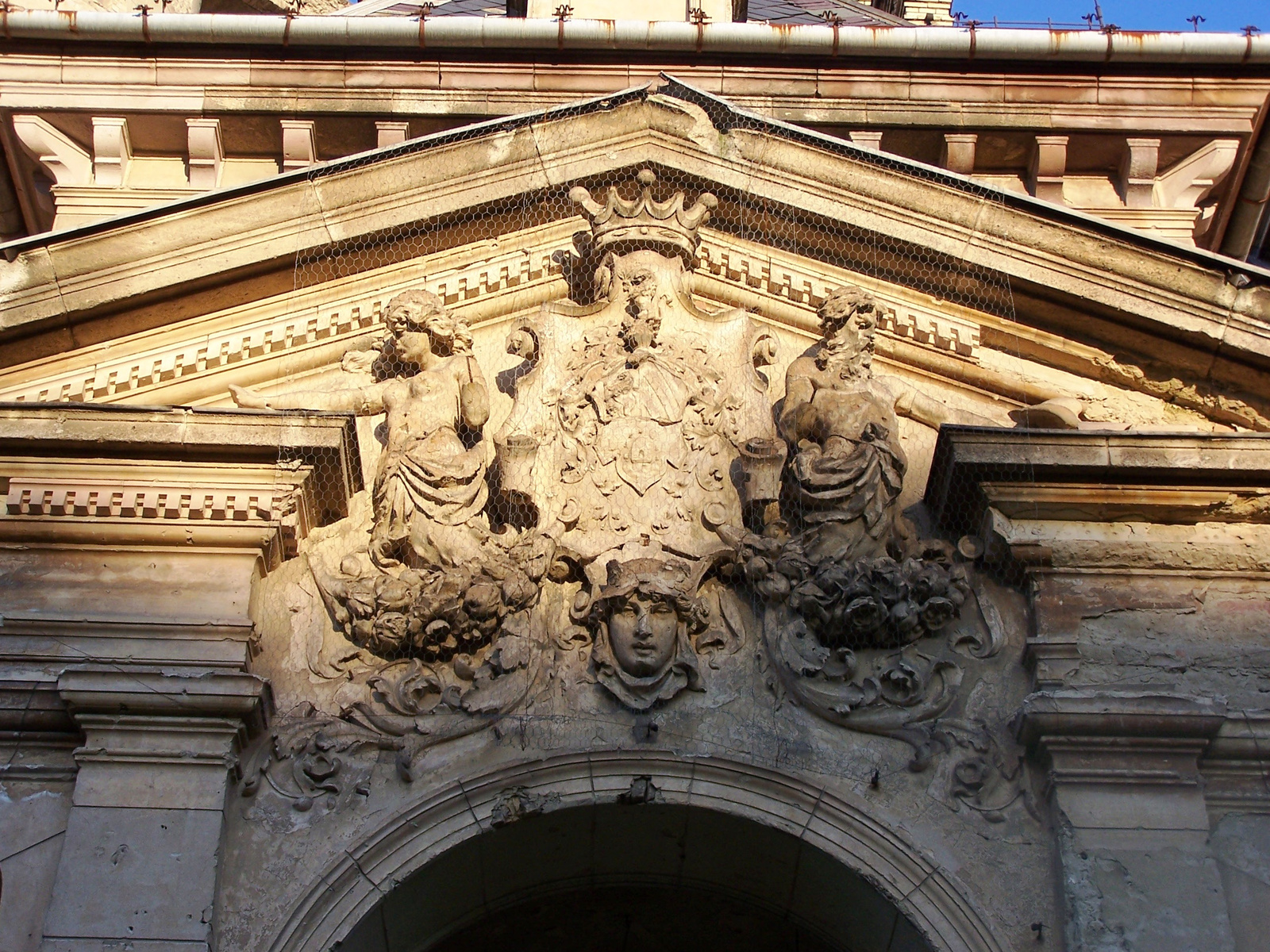 Schossberger-kastély (Tura, Kossuth u.) This is a photo of a monument in Hungary, Identifier: 7474